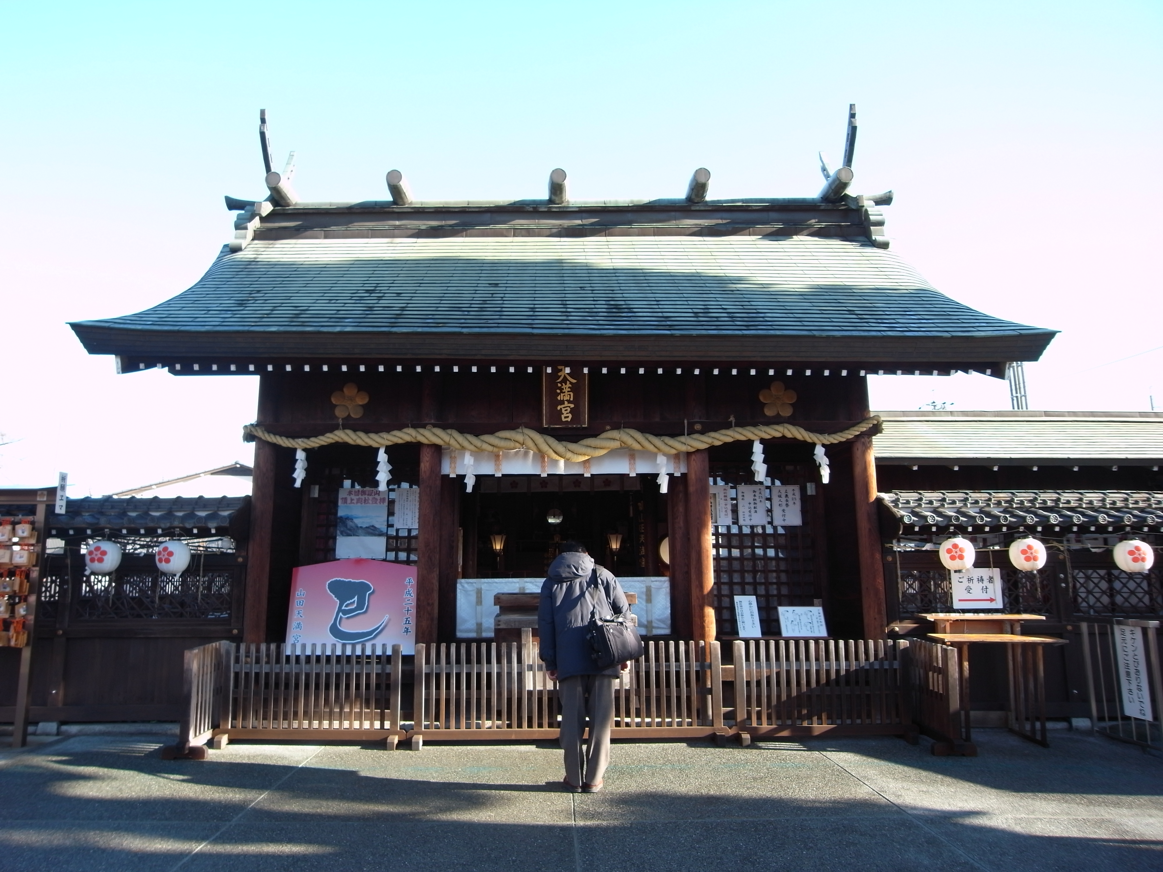 山田天満宮